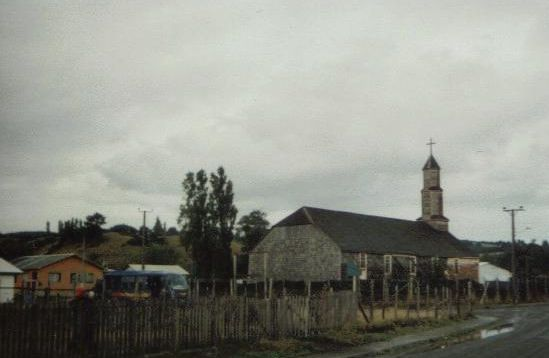 Iglesia en Aldachildo, Isla Lemuy, Provincia de Chiloé, Chile